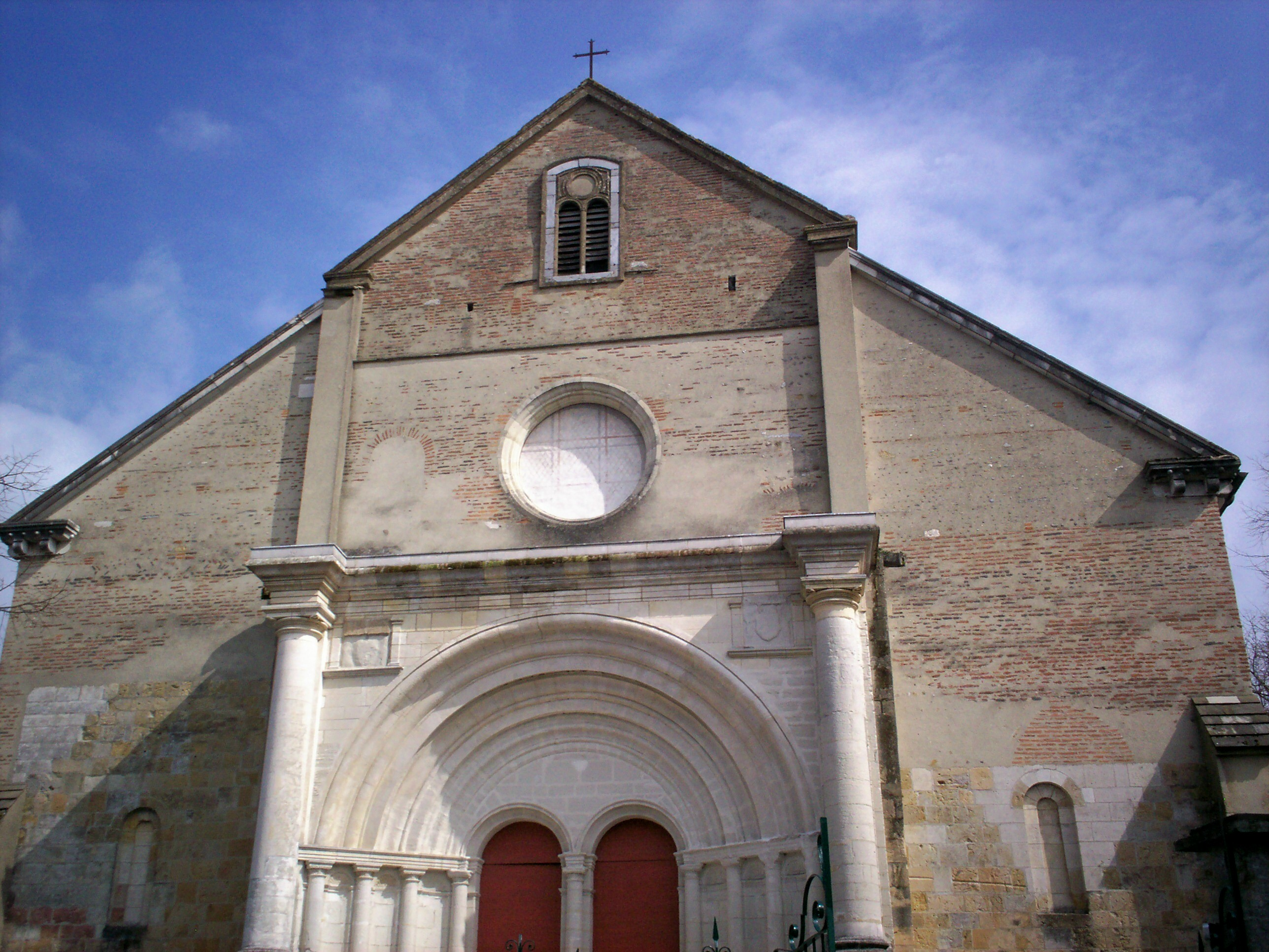 Catedrala de Lescar